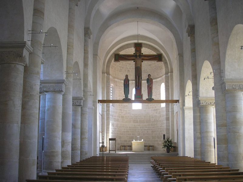 St. Michael (Altenstadt bei Schongau, Obb.). Innenraum nach Osten. Eigene Aufnahme, Sept. 2006 / St. Michael (Altenstadt near Schongau, Upper Bavaria, Germany). The nave to the east. Own photo, Sept. 2006